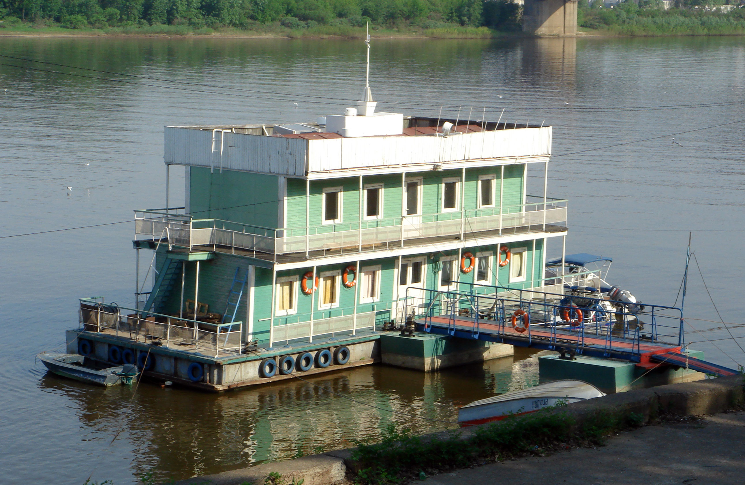 Как это называется?